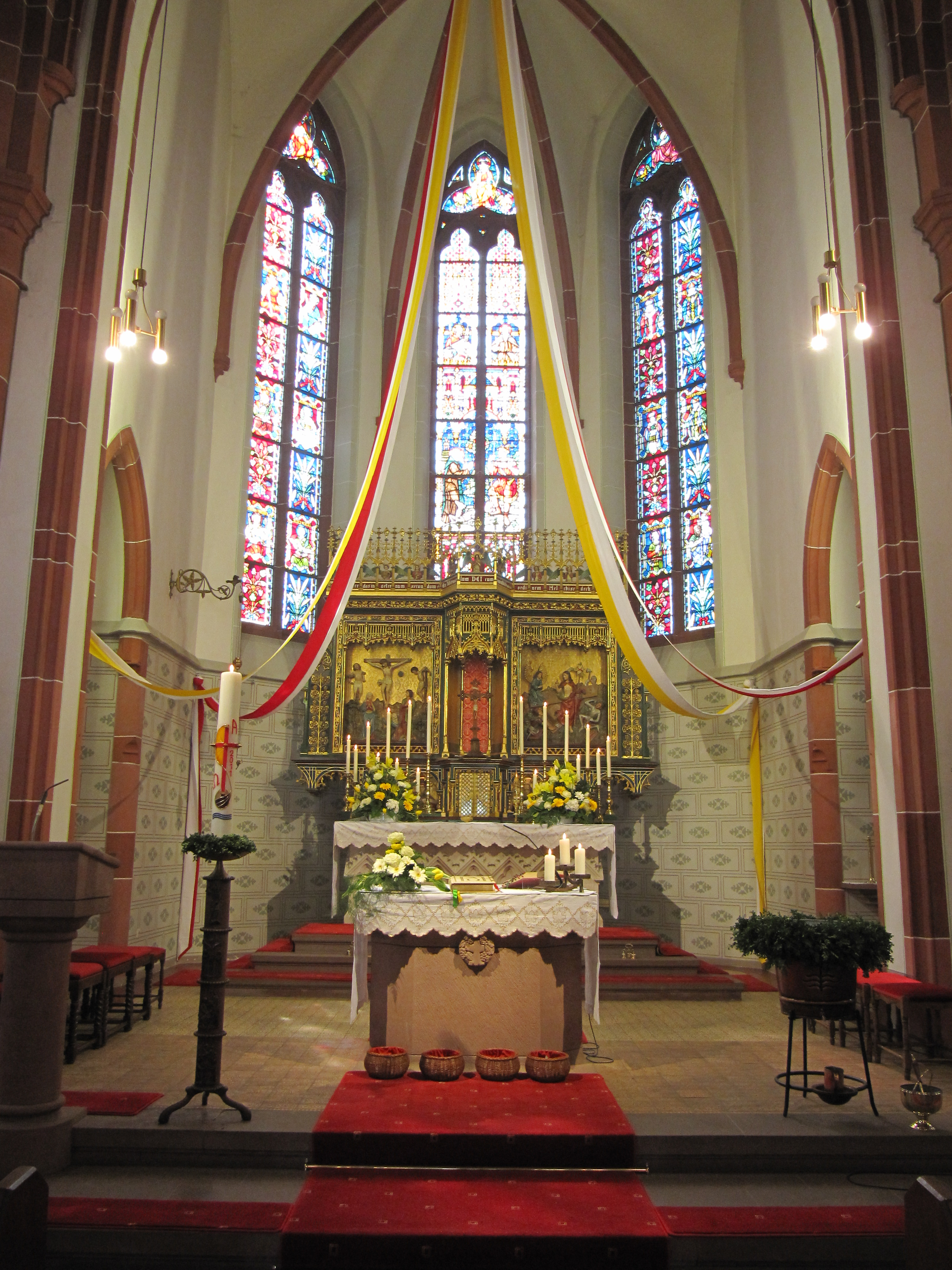 Kath. Pfarrkirche "St. Aegidus" zu Obertiefenbach (Beselich) – Hauptaltar mit Chor